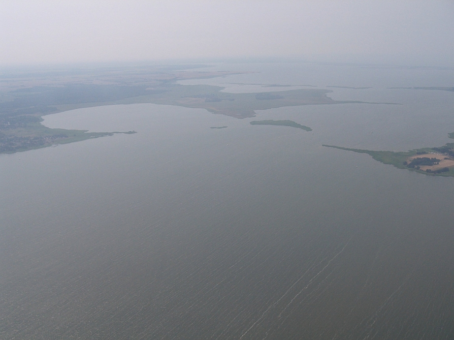 Bodstedter Bodden, Blickrichtung Westen